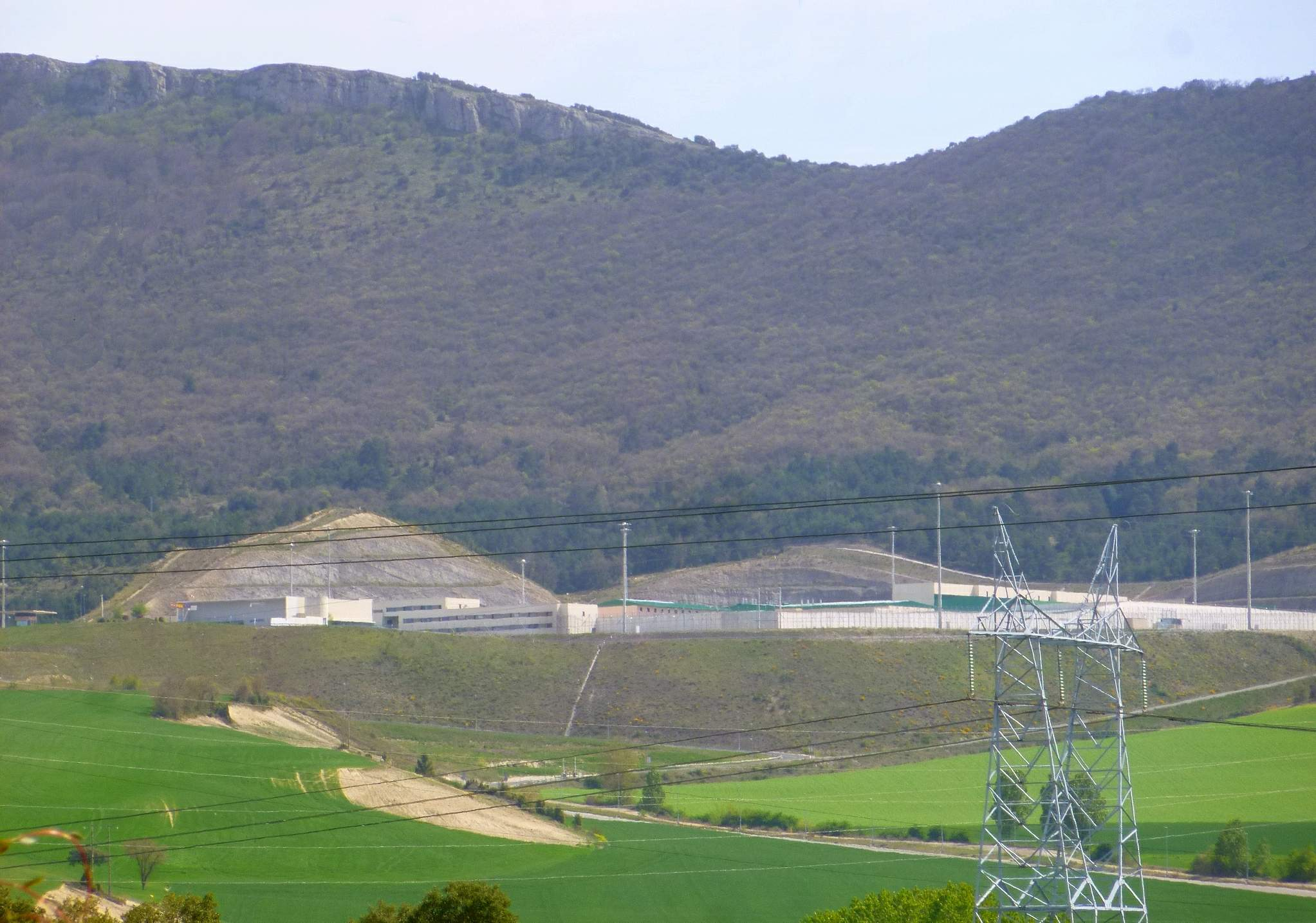 Nanclares de la Oca - Nuevo Centro Penitenciario de Álava, llamada comúnmente Cárcel de Zaballa